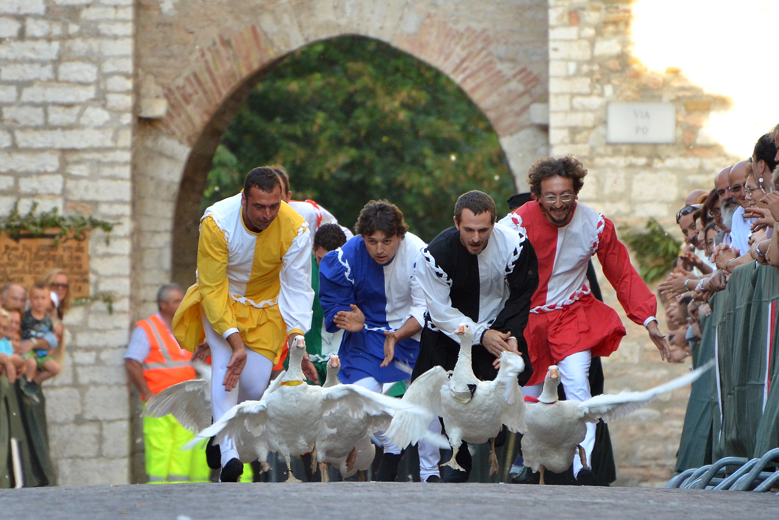 Le oche in gara